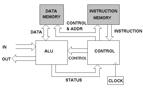 Arquitetura Harvard